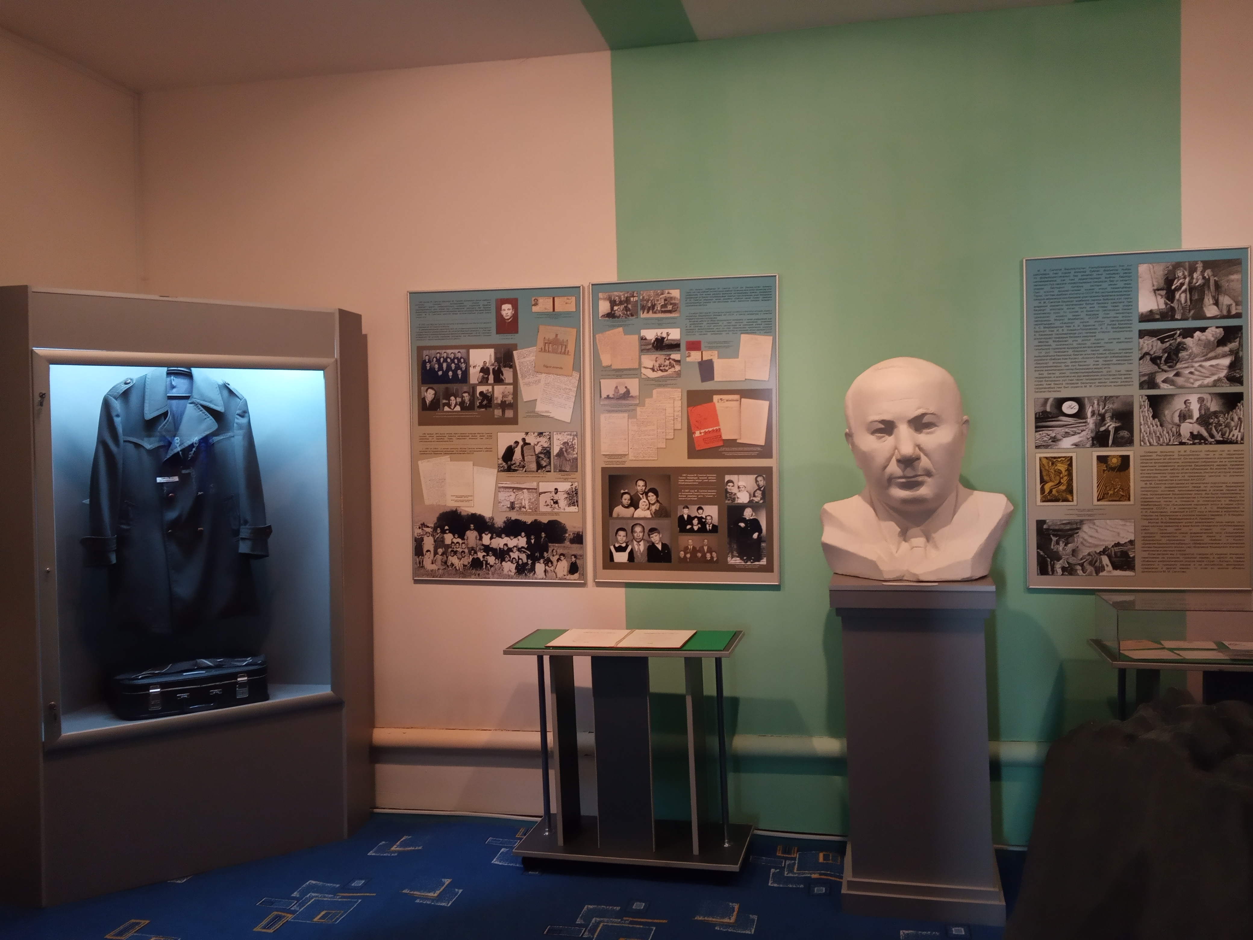 Музей Мухтара Сагитова в селе Старосубхангулово Бурзянского района РБ